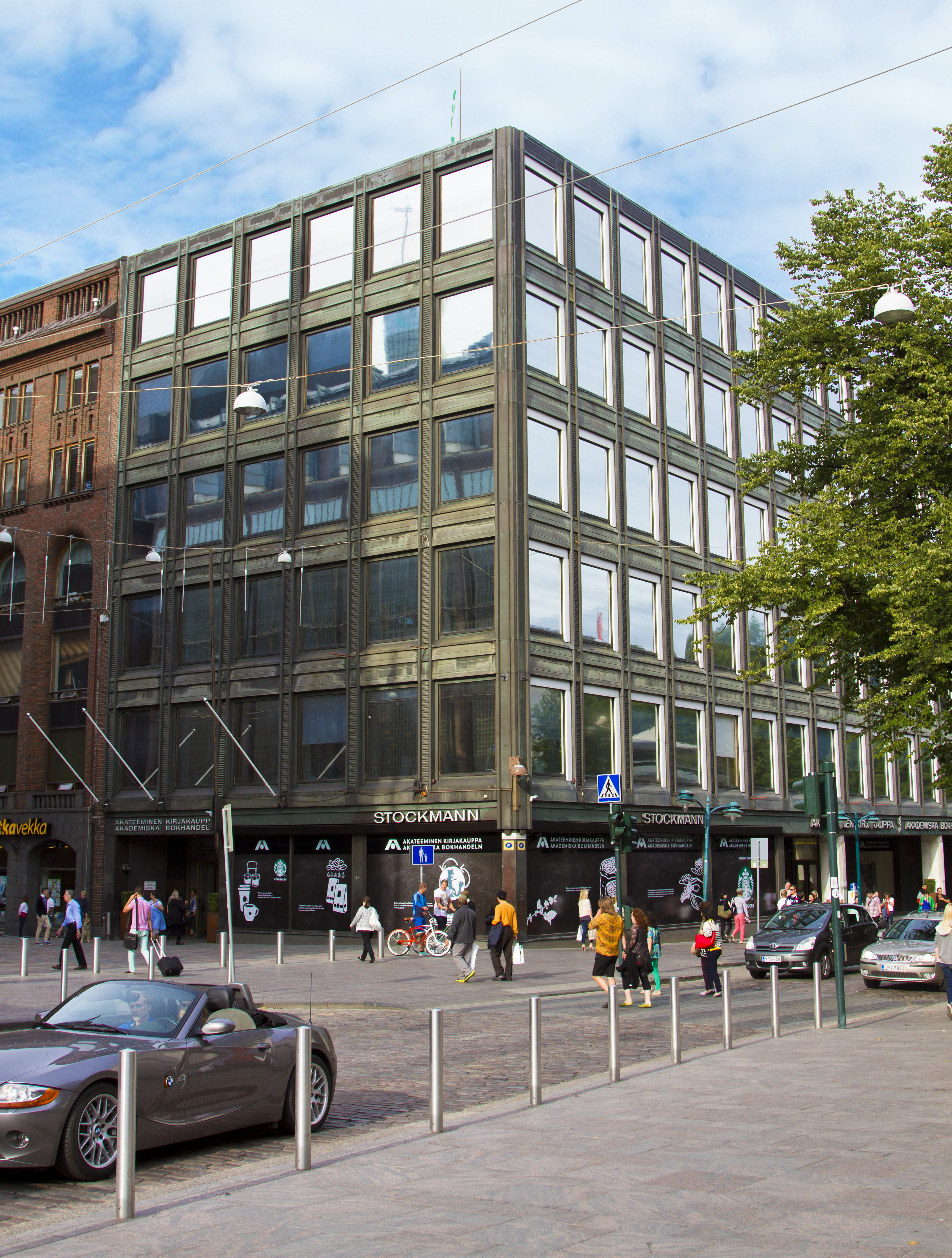 Akateeminen kirjakauppa Helsingin Keskuskadulla 2013